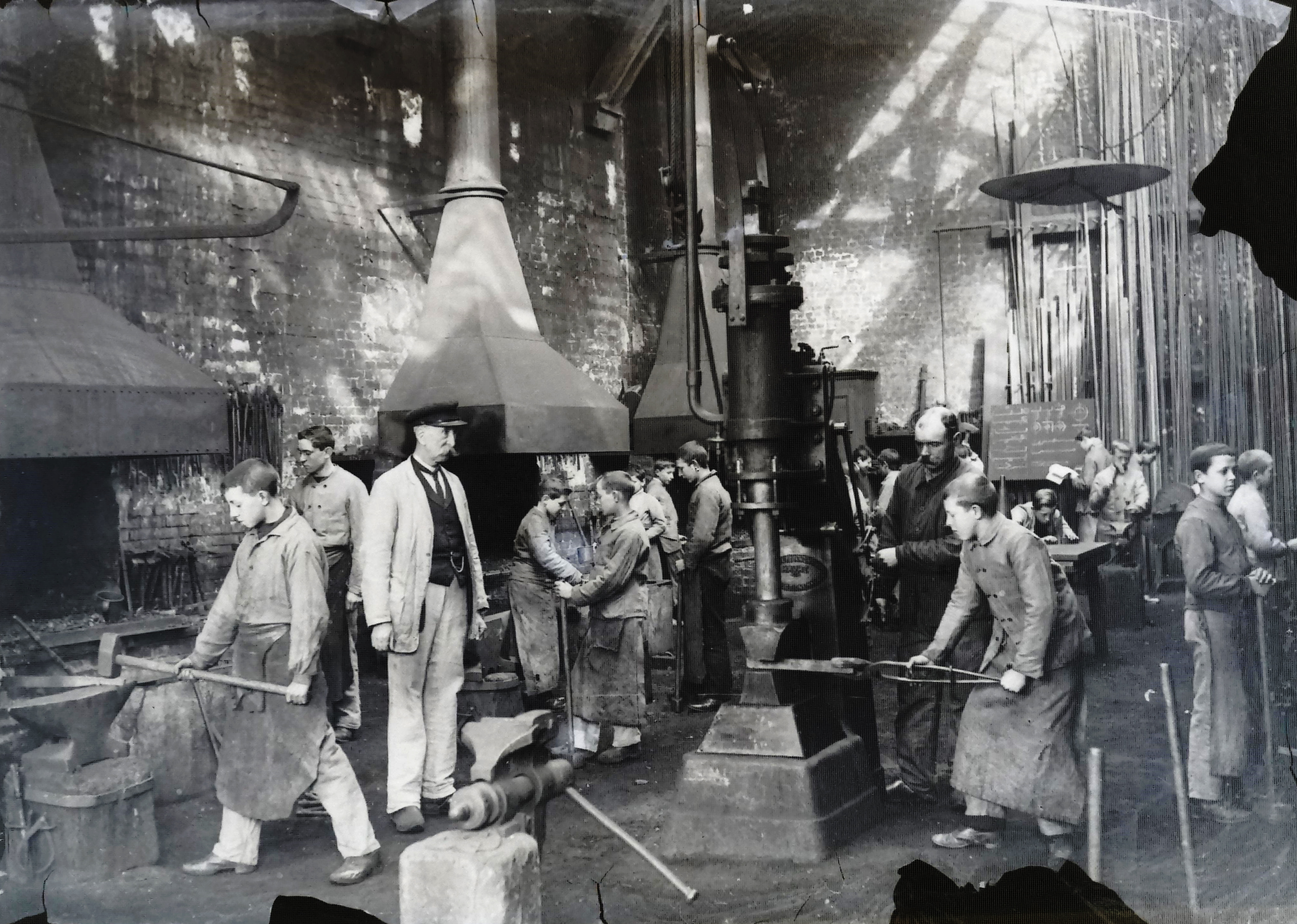 photographie de la section fonderie